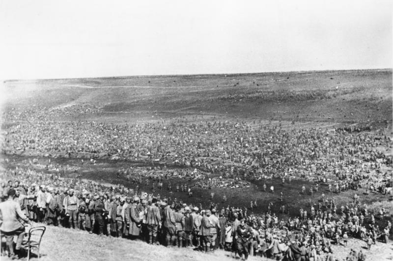 Scherl: Seit Beginn der Frühjahrskämpfe wurden an der Südostfront über eine Million gefangene Bolschewisten eingebracht. Riesig sind auch die Materialverluste der Sowjets. Wieder füllten sich die Gefangenenlager mit Tausenden von Bolschewisten und bedecken mit ihren wimmelnden Massen weiterhin das Gelände. PK-Aufnahme: Kriegsberichter Wahner 13.8.1942 [Herausgabedatum]